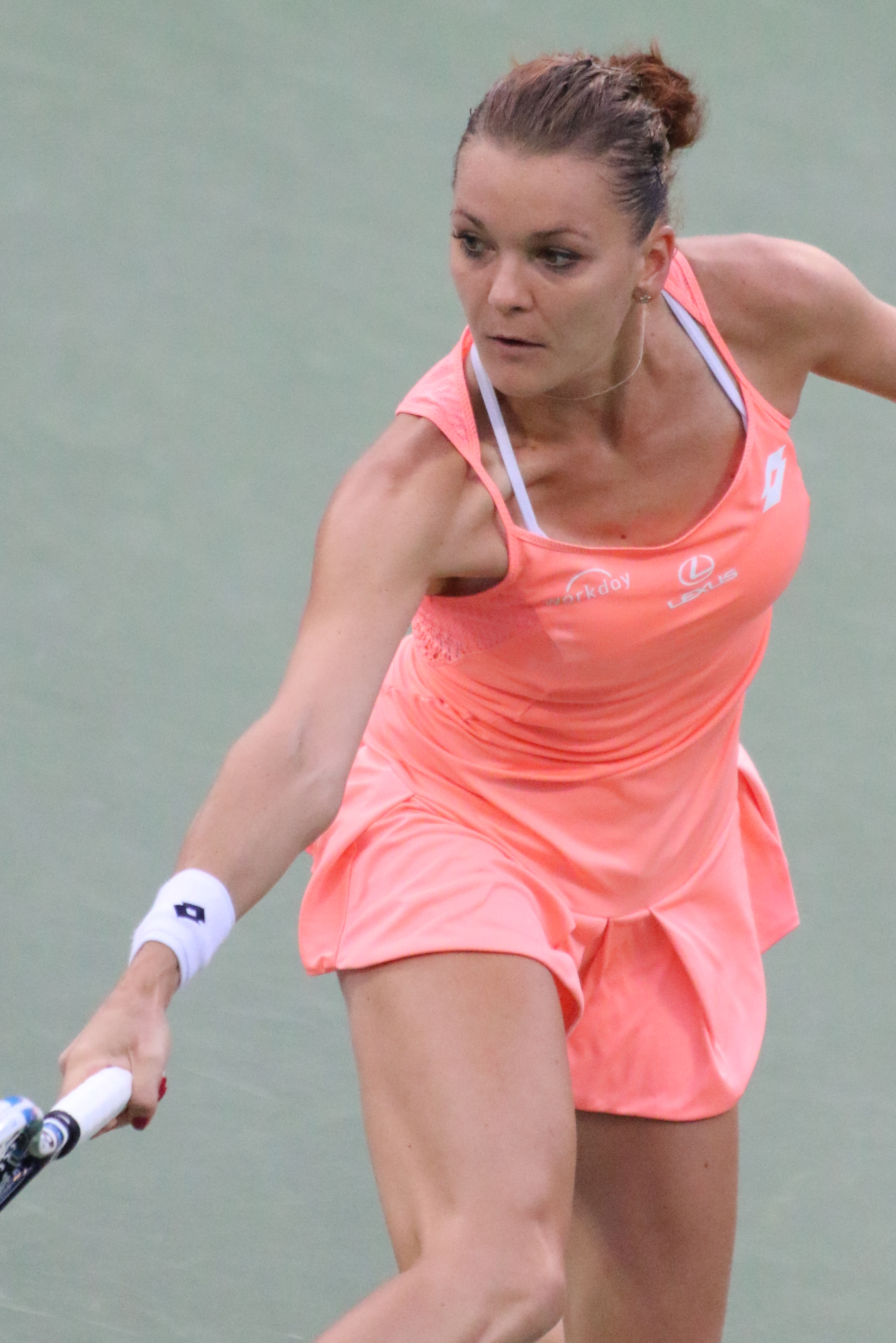 Radwanska US16 (20)